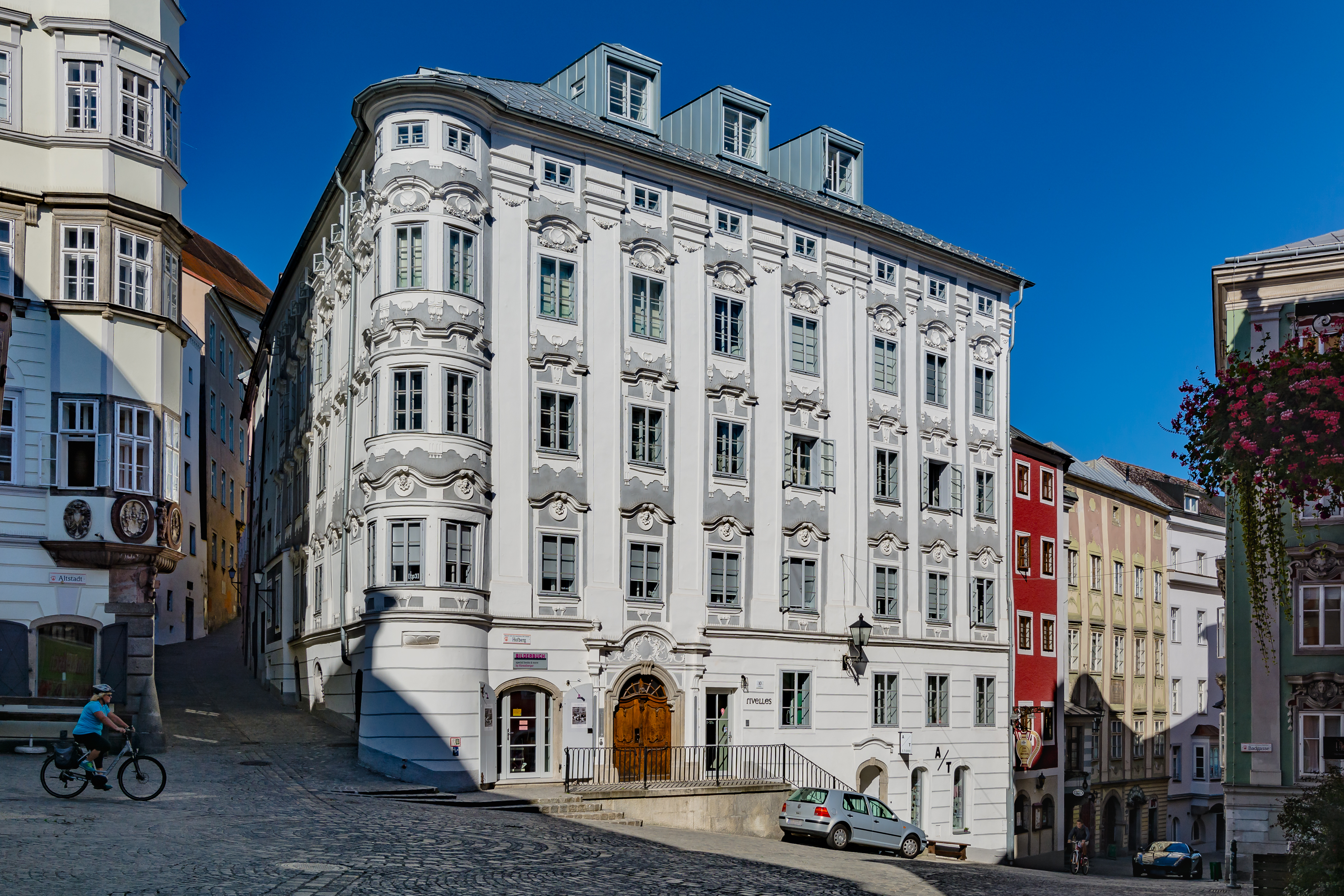 Das Apothekerhaus Hofberg 10 in der Linzer Altstadt wie es sich im September 2016 präsentiert.